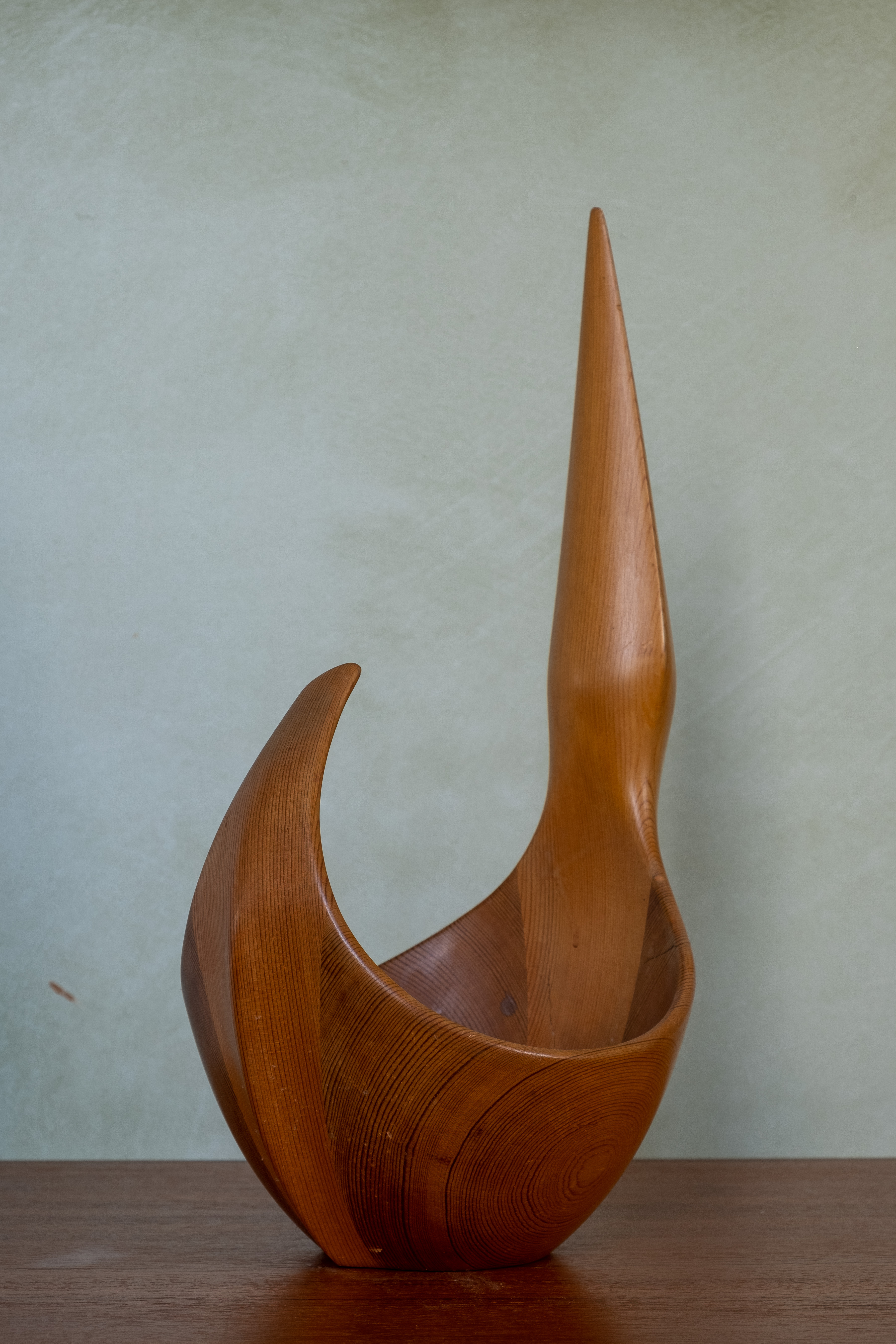 En ölgås av den svenska konsthantverkaren Johnny Mattsson